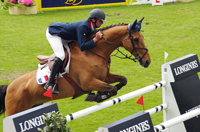 Olivier Guillon et Lord de Theize lors de la Coupe des Nations du CSIO-5* de La Baule (17 mai 2013).